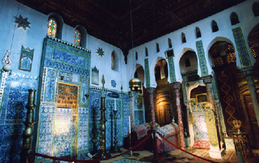 Salle dite "La Mosquée" de la maison de Pierre Loti, maintenant devenue musée